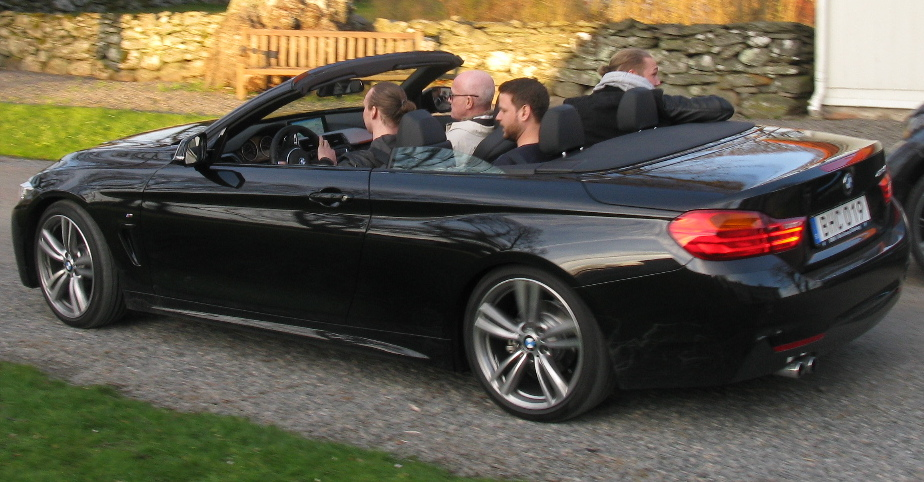 BMW 428i Cabriolet M Sport